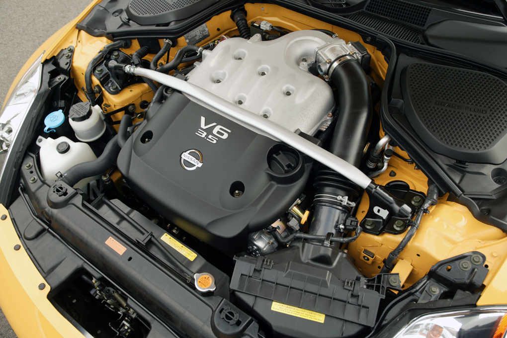 Nissan VQ35DE engine.